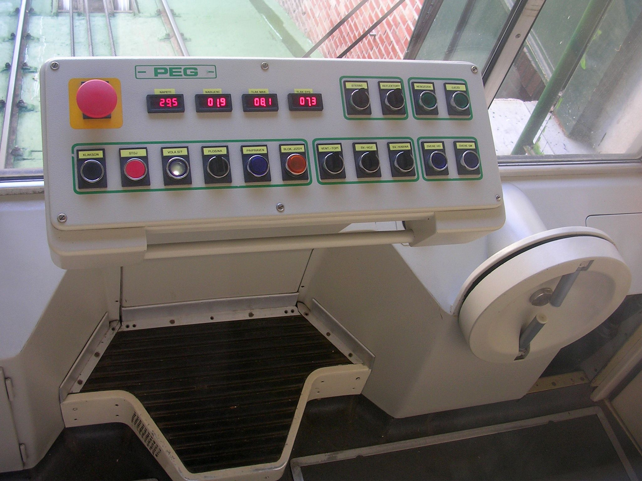 Praha, lanová dráha na Petřín: ovládací kabina vozu